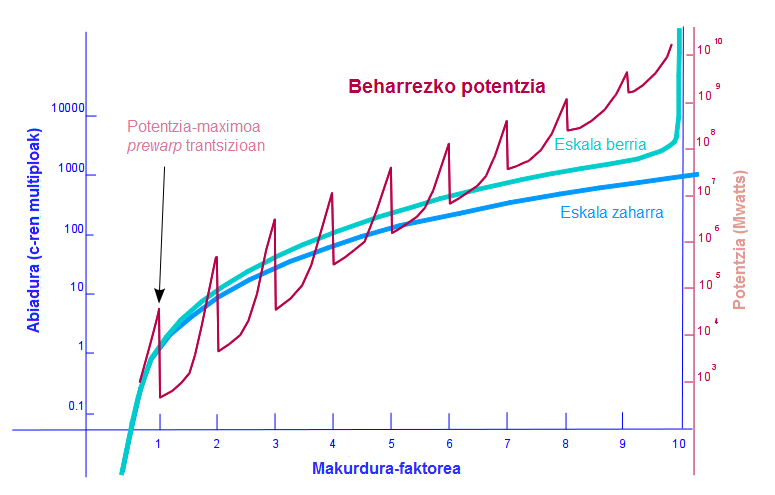 Michael Okuda Star Trek-eko gidoilariaren eskala berria azaltzen duen grafikoa.